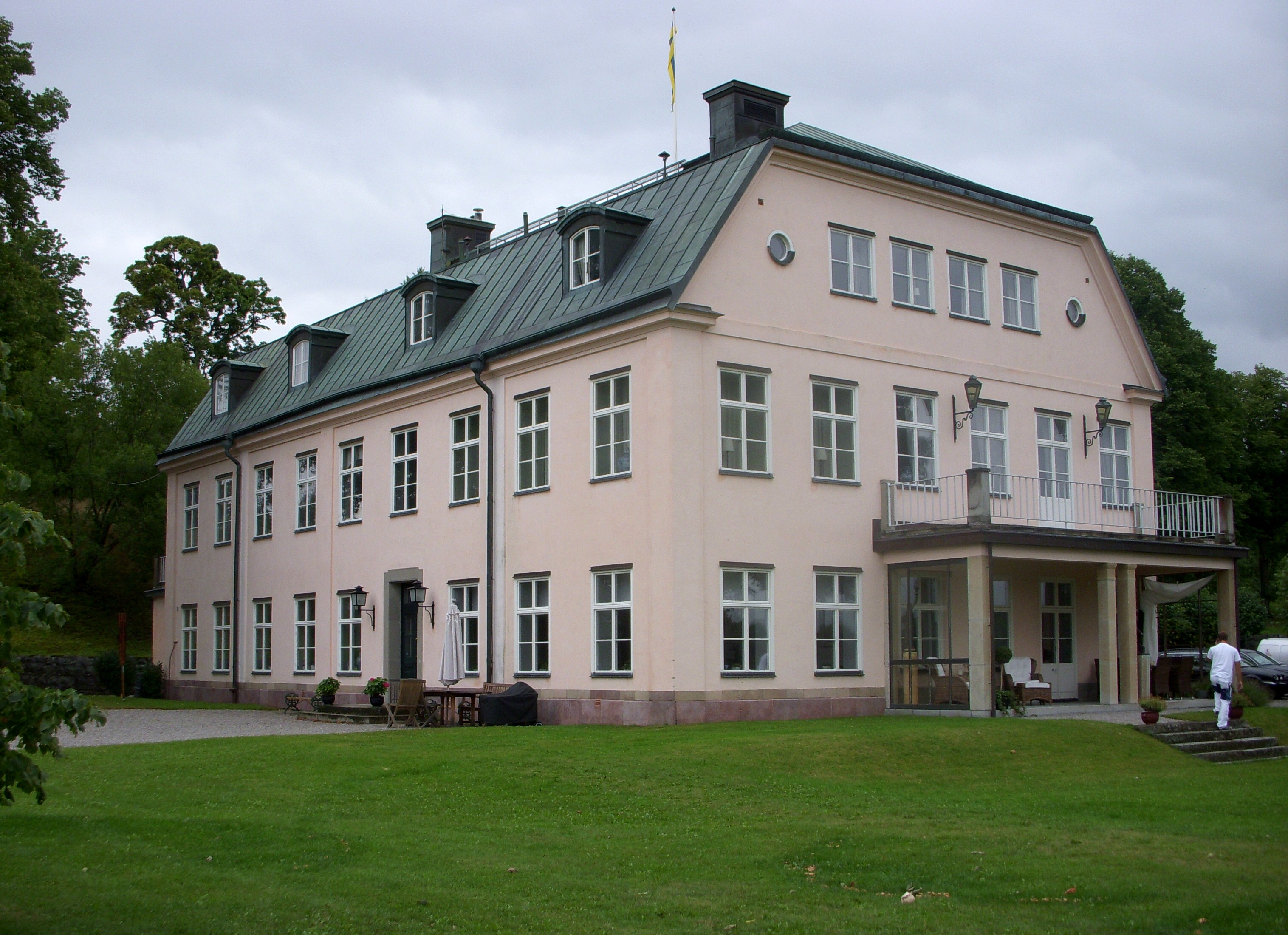 Säteriet "Malmvik", Ekerö kommun